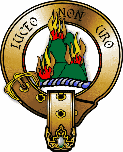 Clan Mackenzie Crest